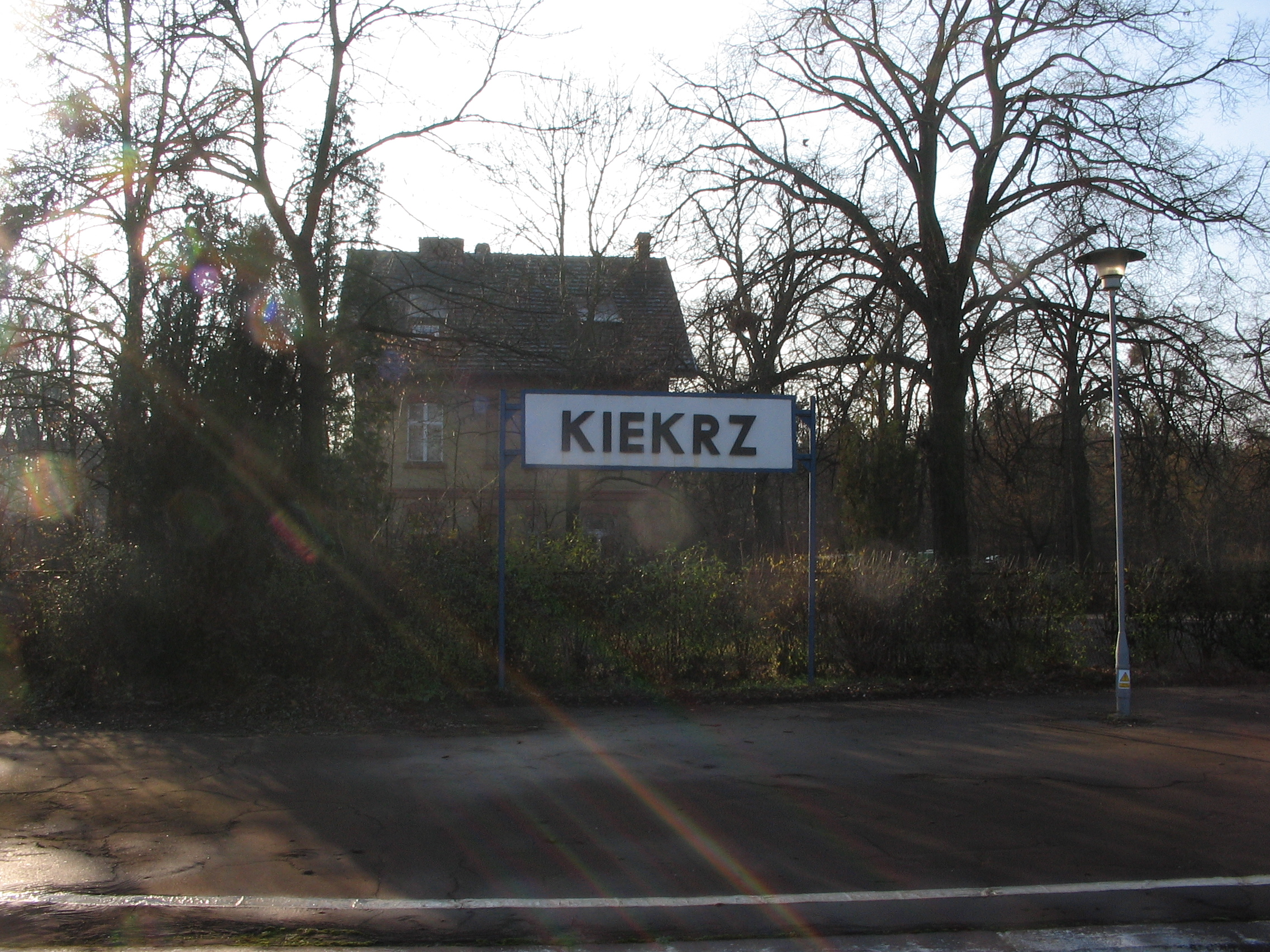 stacja Kiekrz - widok na peron i tablicę z nazwą stacji